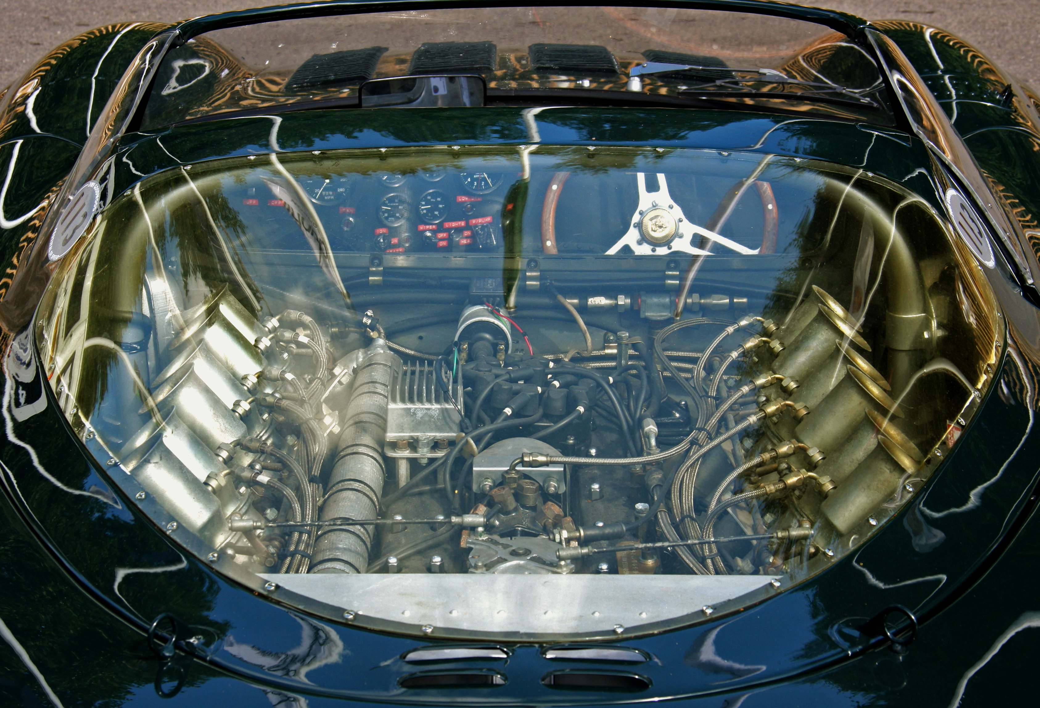 1966 Jaguar XJ13 engine